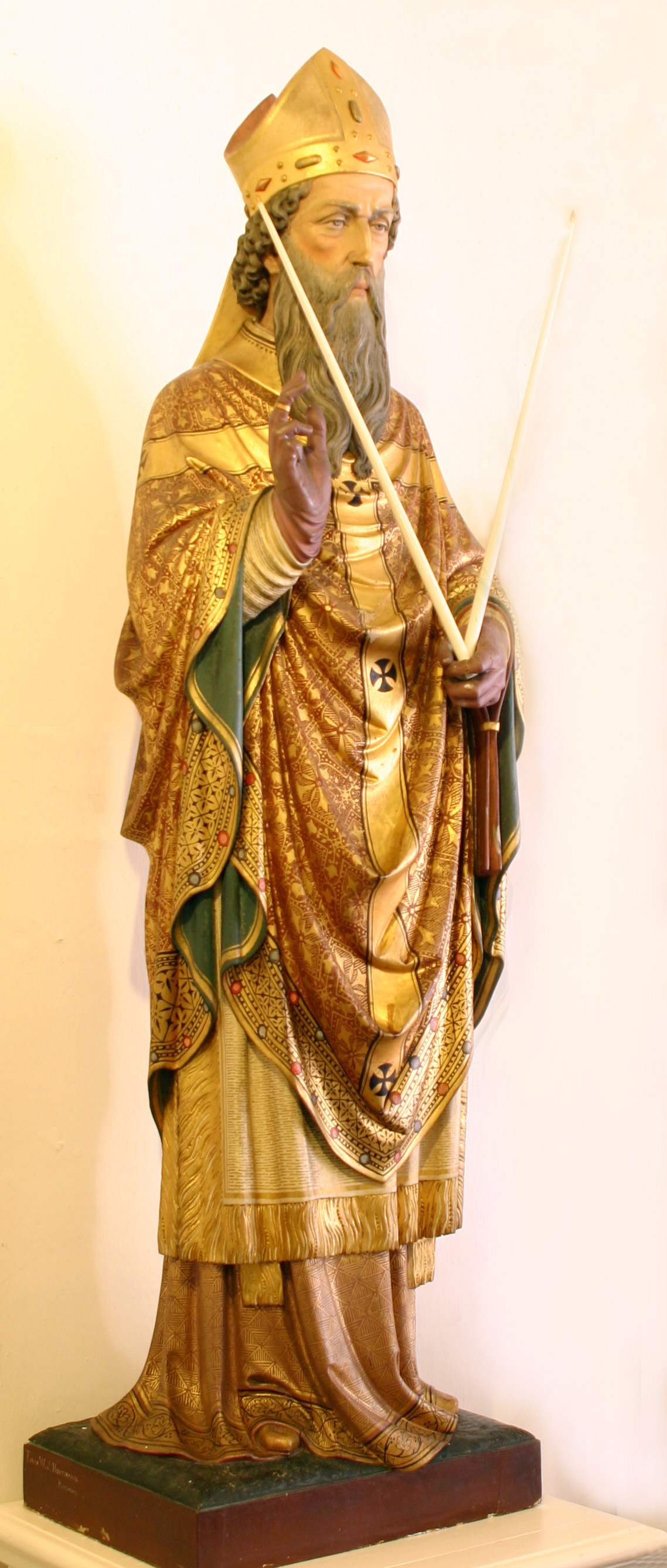 Blasius-Statu an der Abteikierch vun Thorn aus dem Joer 1875 vum W.J. Houtermans vu Roermond.